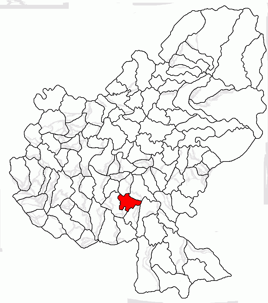 Categorie:Hărţi ale judeţului Mureş